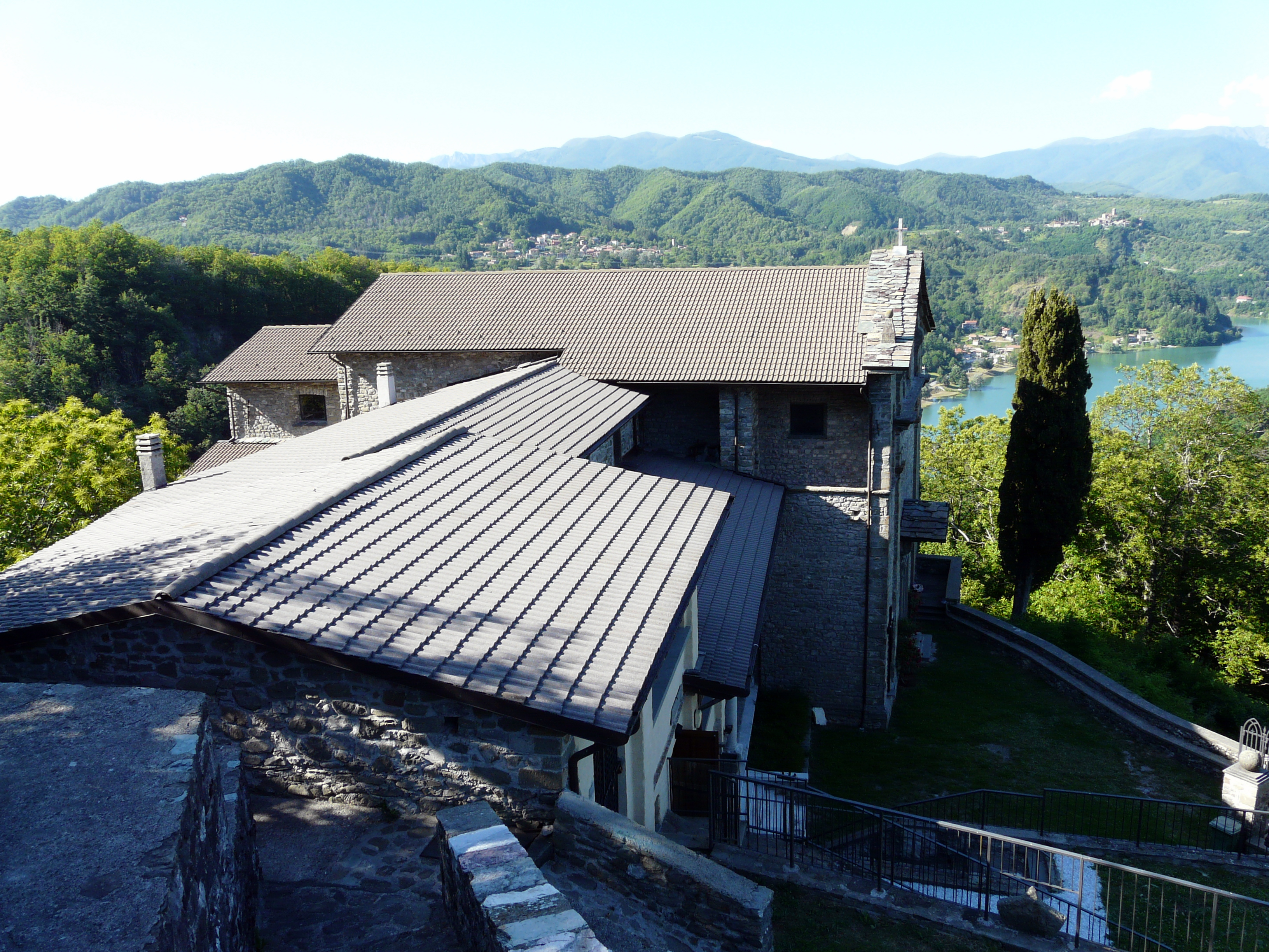 Il museo e la chiesa vecchia di Gorfigliano, Minucciano, Toscana, Italia